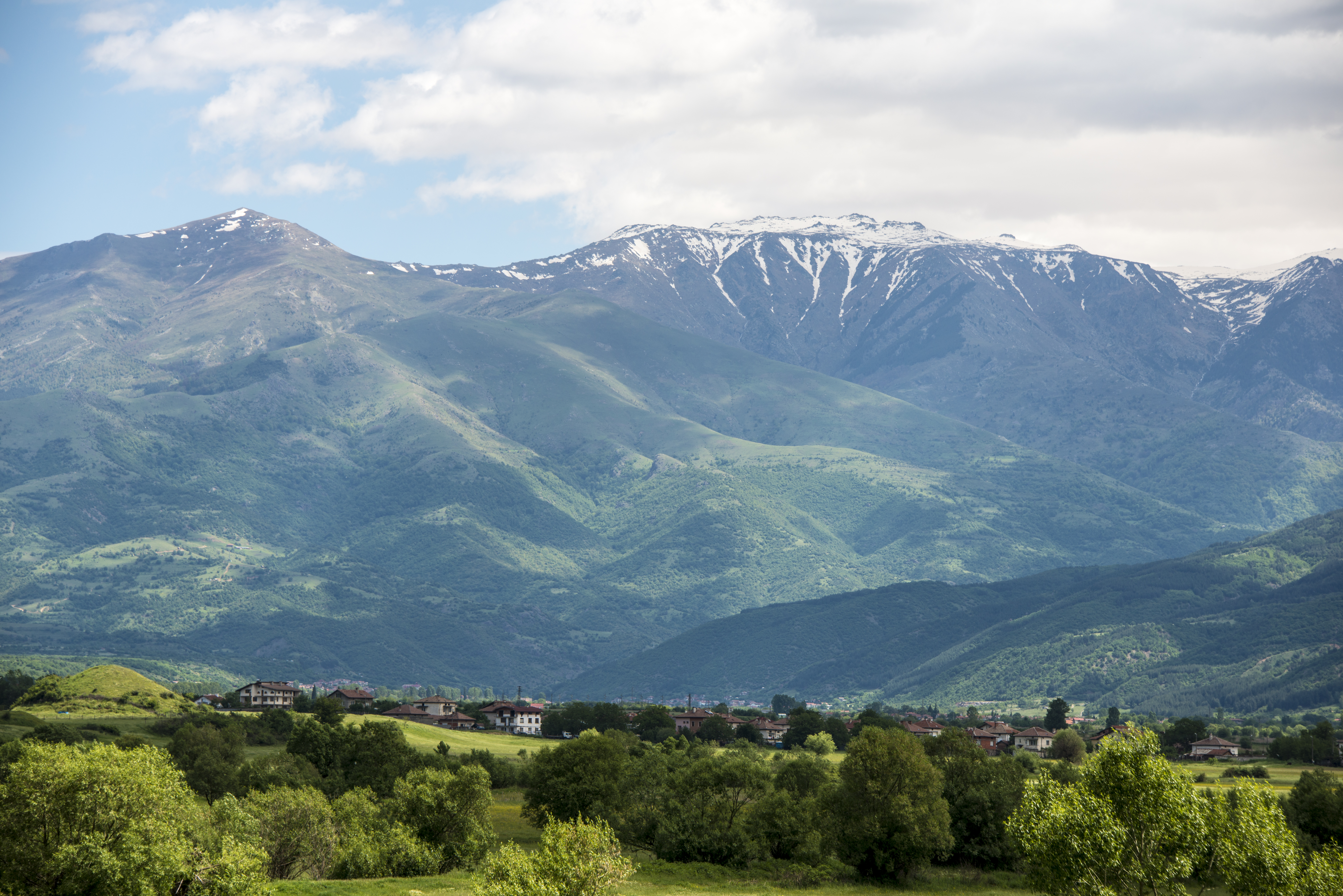 Рила, Рила